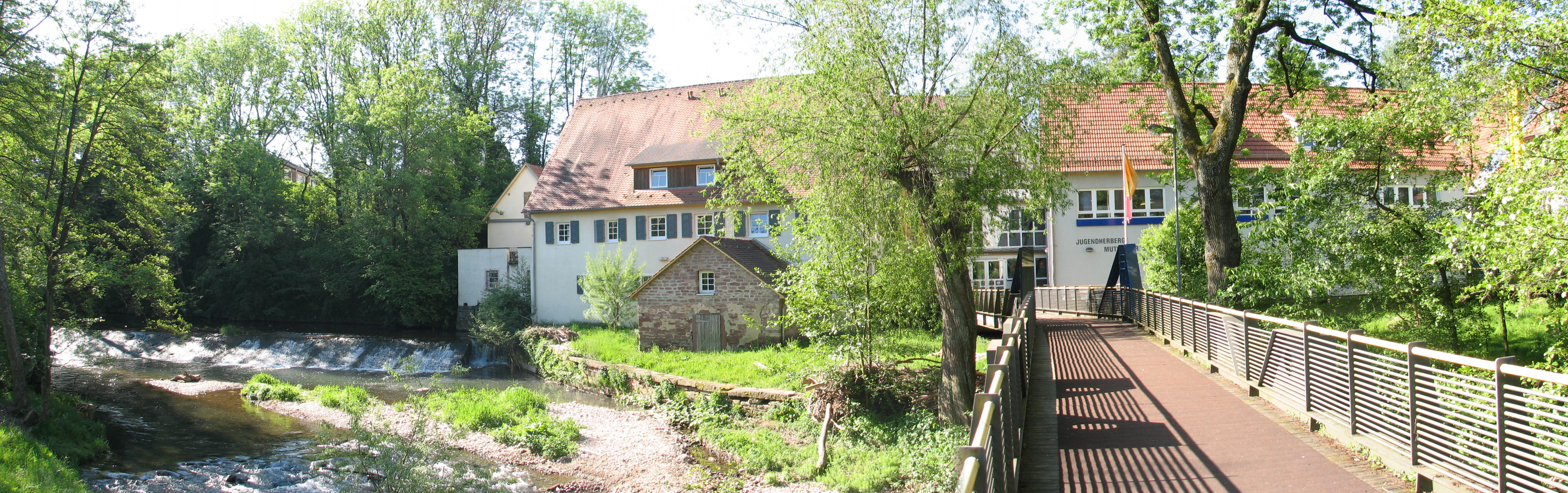 Mutschlers Mühle in Mosbach, heute eine Jugendherberge